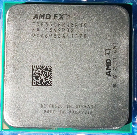 Handelsüblicher AMD FX 8350 Prozessor hergestellt in Dresden